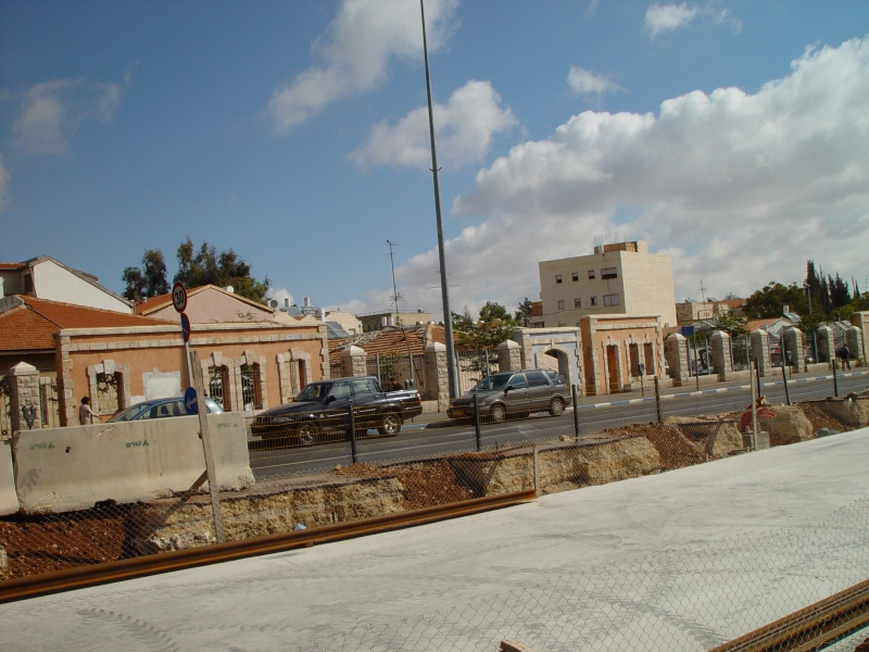 מבט על שכונת שערי ירושלים מרחוב יפו